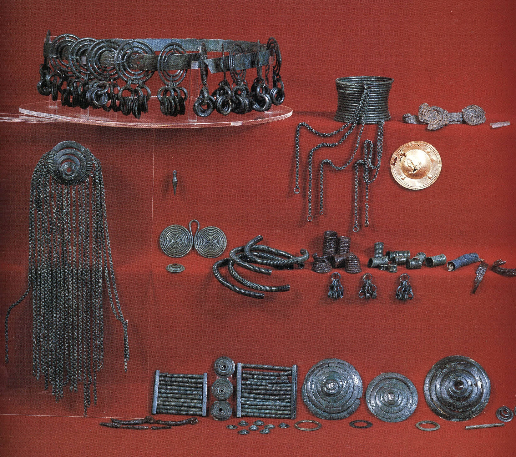 D’après Greci, Enotri e Lucani, 1996.